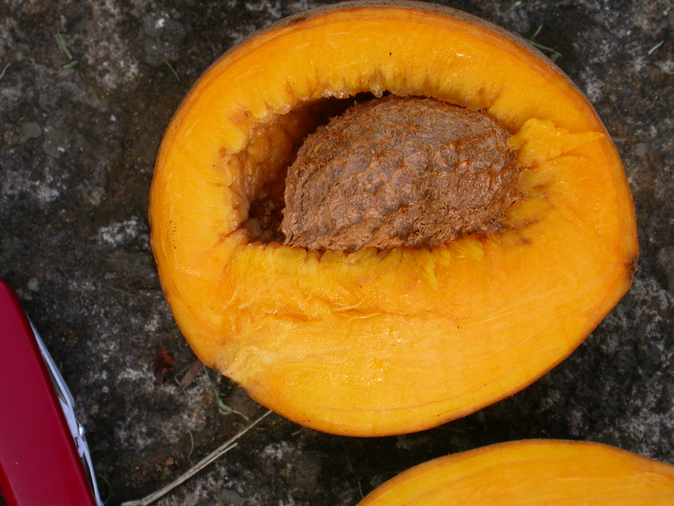 Fruit ouvert, le noyau non adhérent à la pulpe